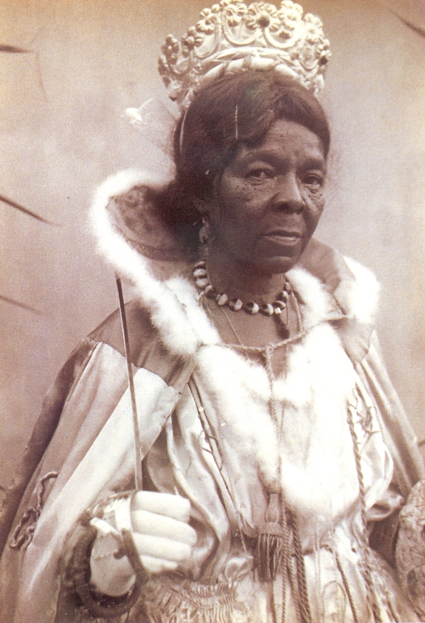 Dona Santa, Rainha do Maracatu Elefante. Foto tirada por volta de 1935 — Recife, Pernambuco, Brasil.